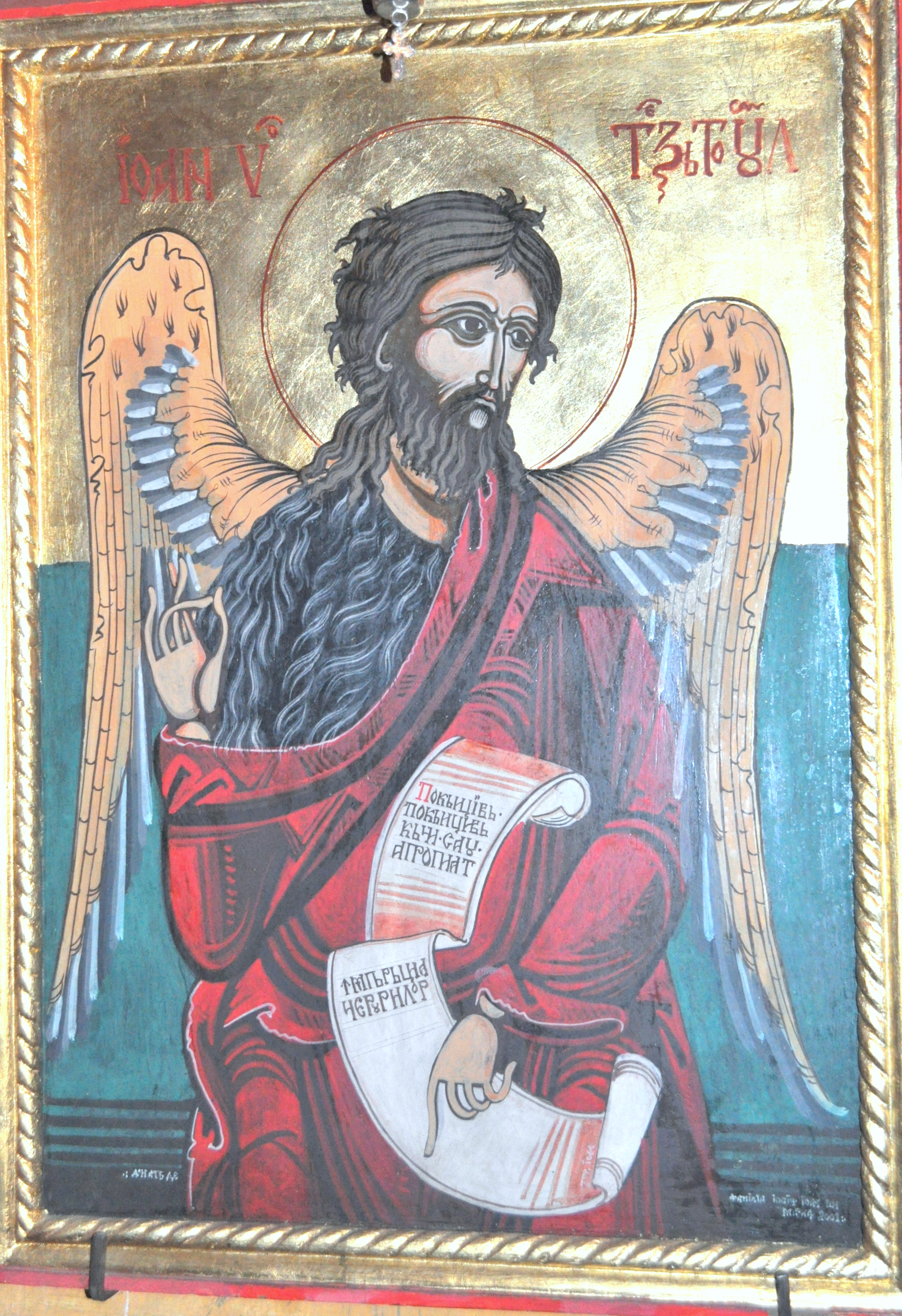 Biserica "Sf. Nicolae" din Mohu, județul Sibiu